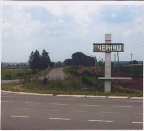 Description:село Черниш; Source: собственная работа; дата Date:11.05.2004; Author: Луговська Т.С; Permission: Multi-license